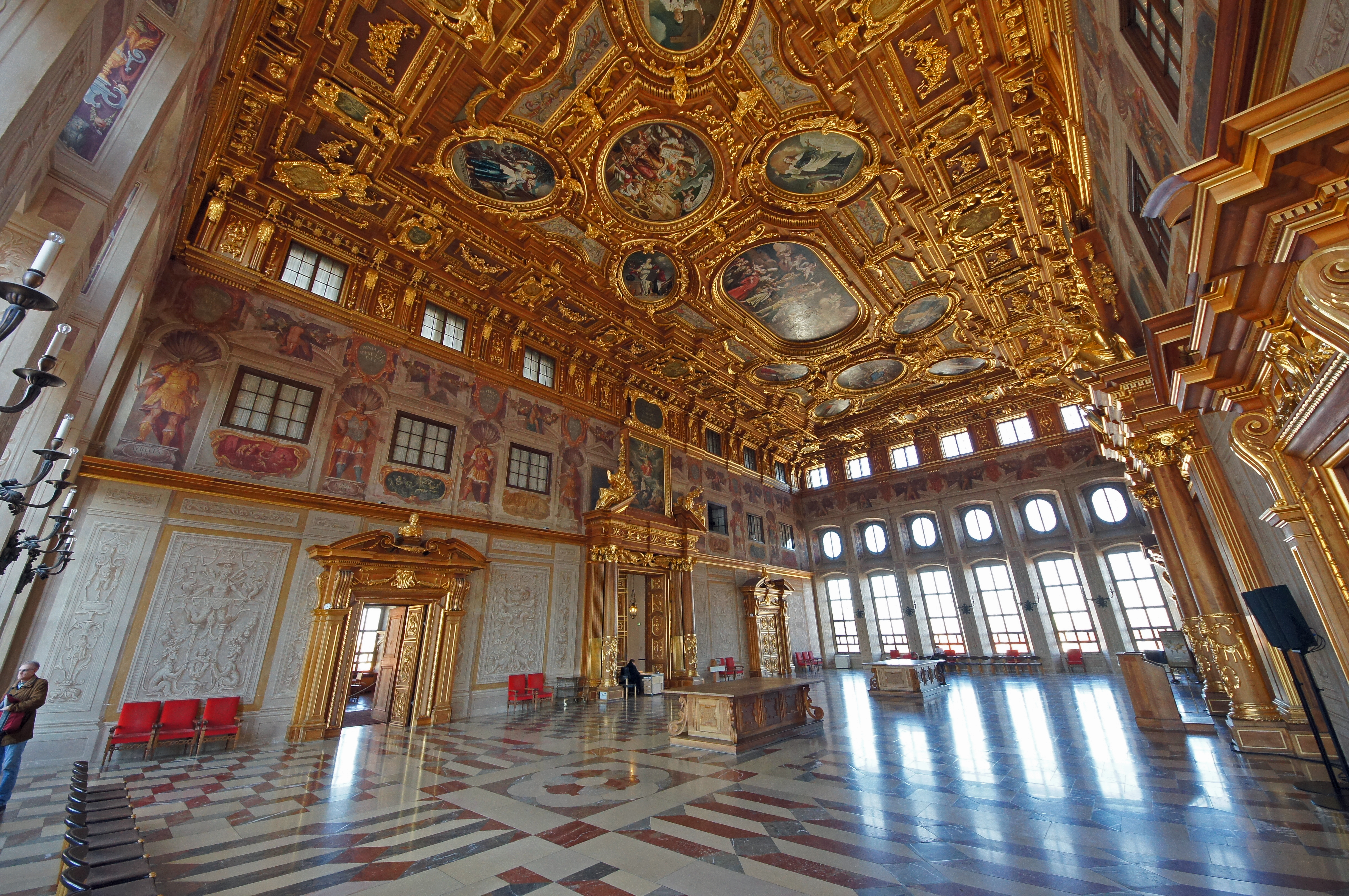 2011-02-26 Augsburg 010 Rathaus, Goldener Saal